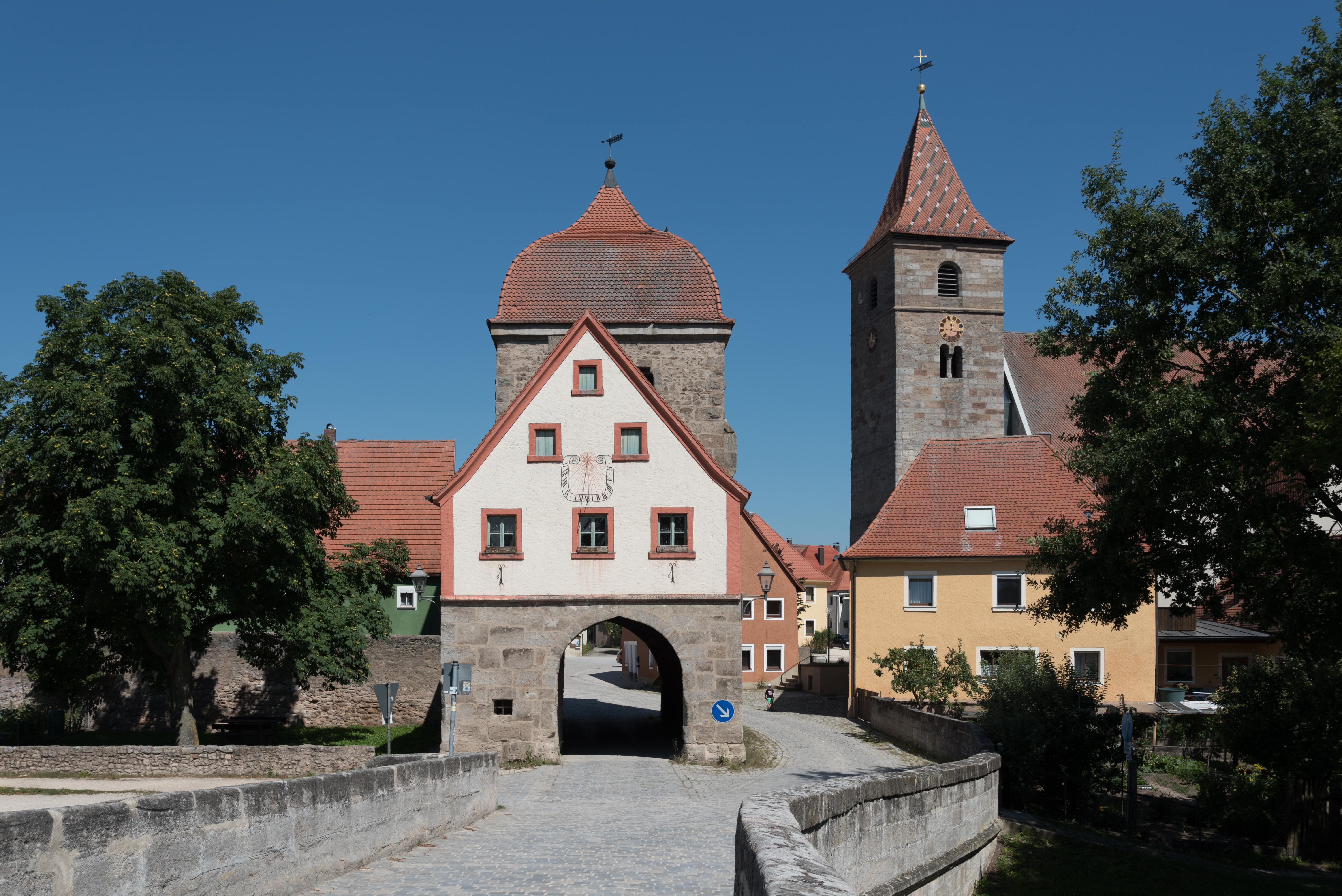 Ornbau, Altmühlbrücke, Unteres Tor